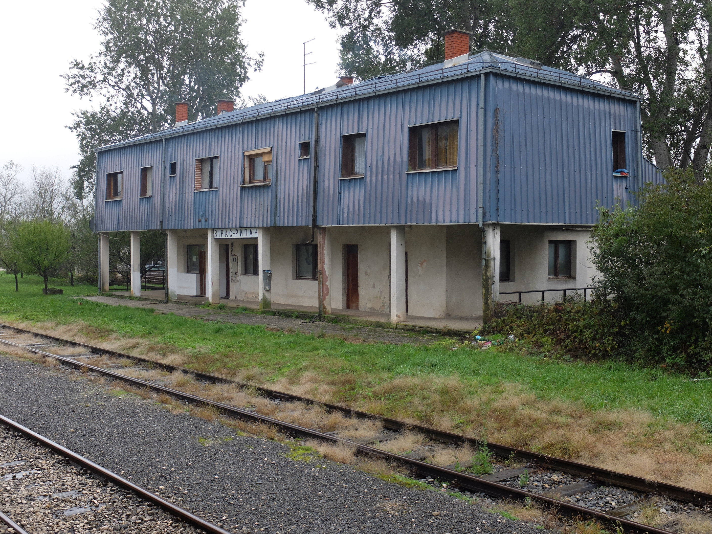 Ripač (Željeznički kolodvor)